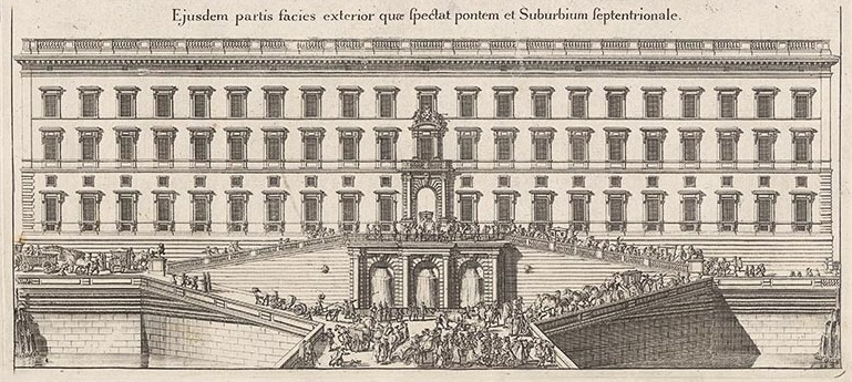 Stockholms slott: Norra längan Dessa bilder av slottet, efter Nikodemus Tessin d.y:s ritningar, är utförda före branden 1697, enl. Erik Vennberg